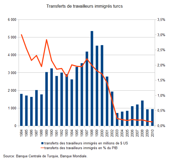 Transferts des travailleurs immigrés turcs - Source: Banque Centrale de Turquie, Banque Mondiale.